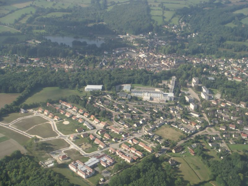 Vue aérienne